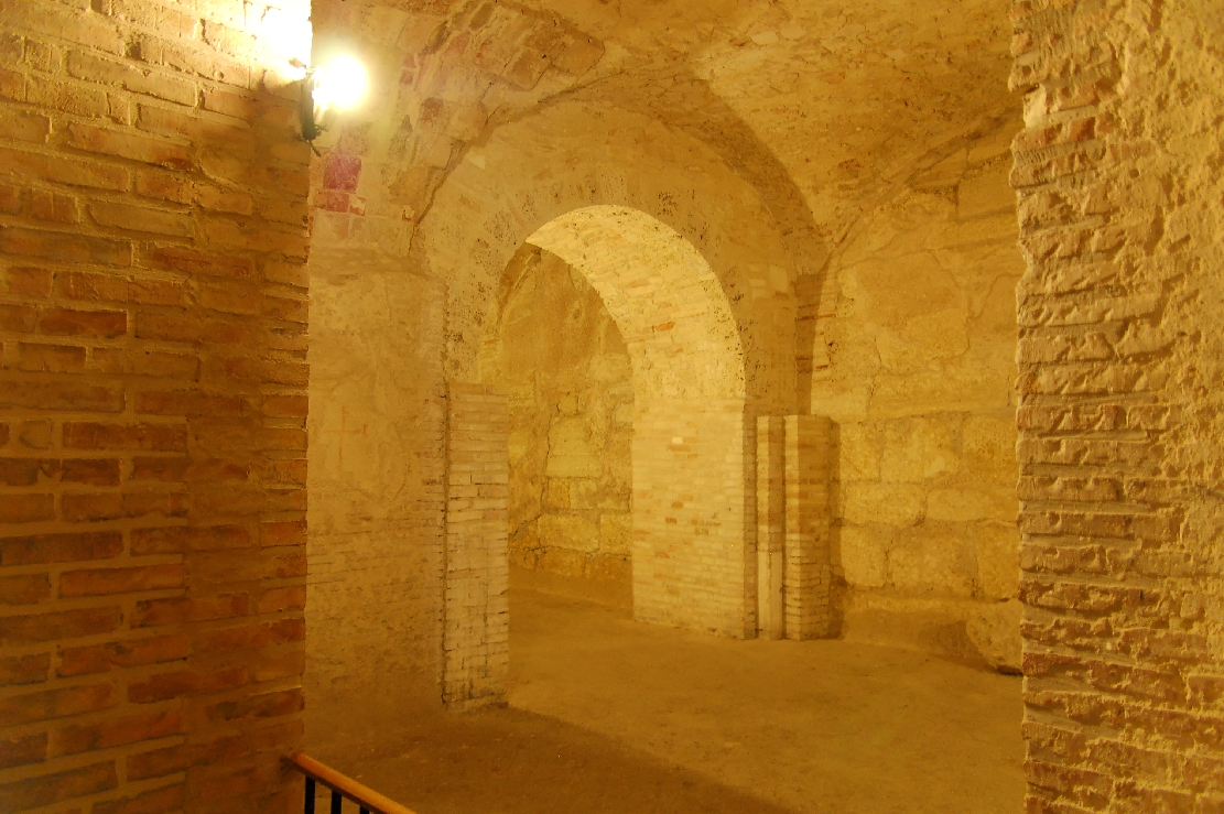 Atri 2011